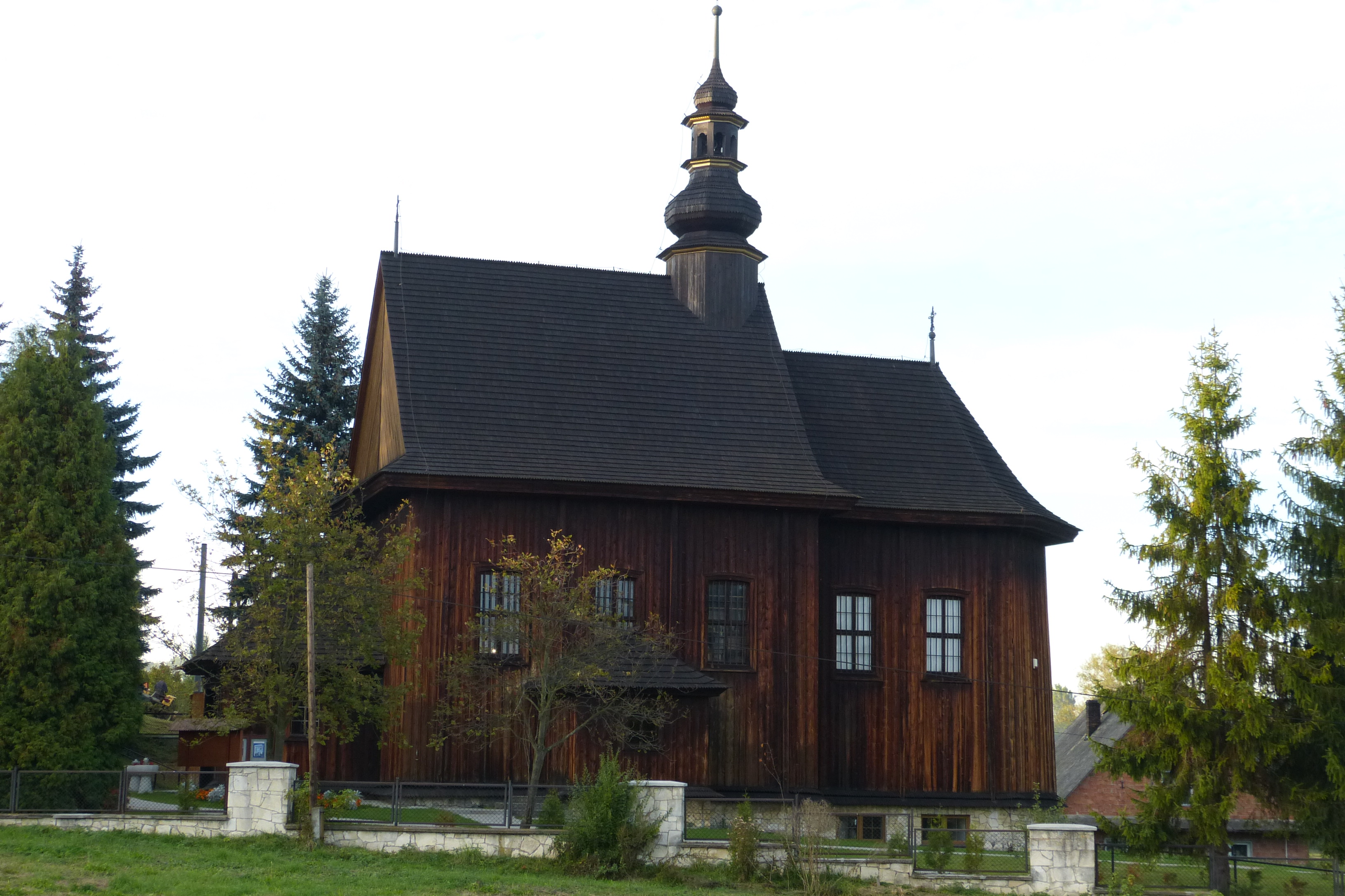 Przesławice - rzymskokatolicki kościół parafialny pw. Najświętszej Marii Panny Matki Kościoła. Pierwotnie powstał w pobliskiej Gołczy, gdzie wzniesiono go w XVIII w. z wykorzystaniem fragmentów kościoła z 1657 roku